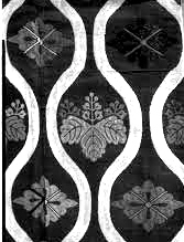 古着物